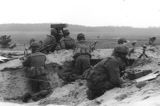 B-Stelle der schweren Kompanie des Luftsturmregiment 40